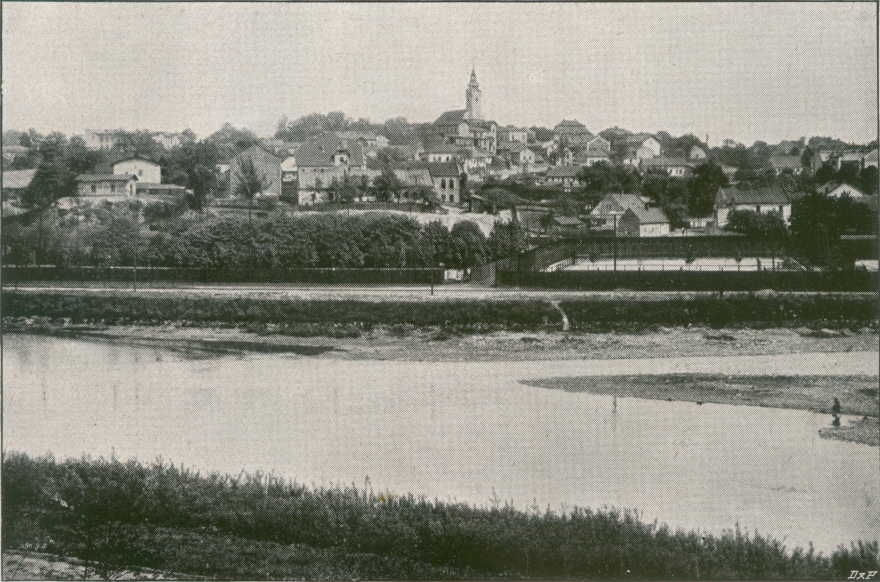 Polská (dnes Slezská) Ostrava, celkový pohled od západu.